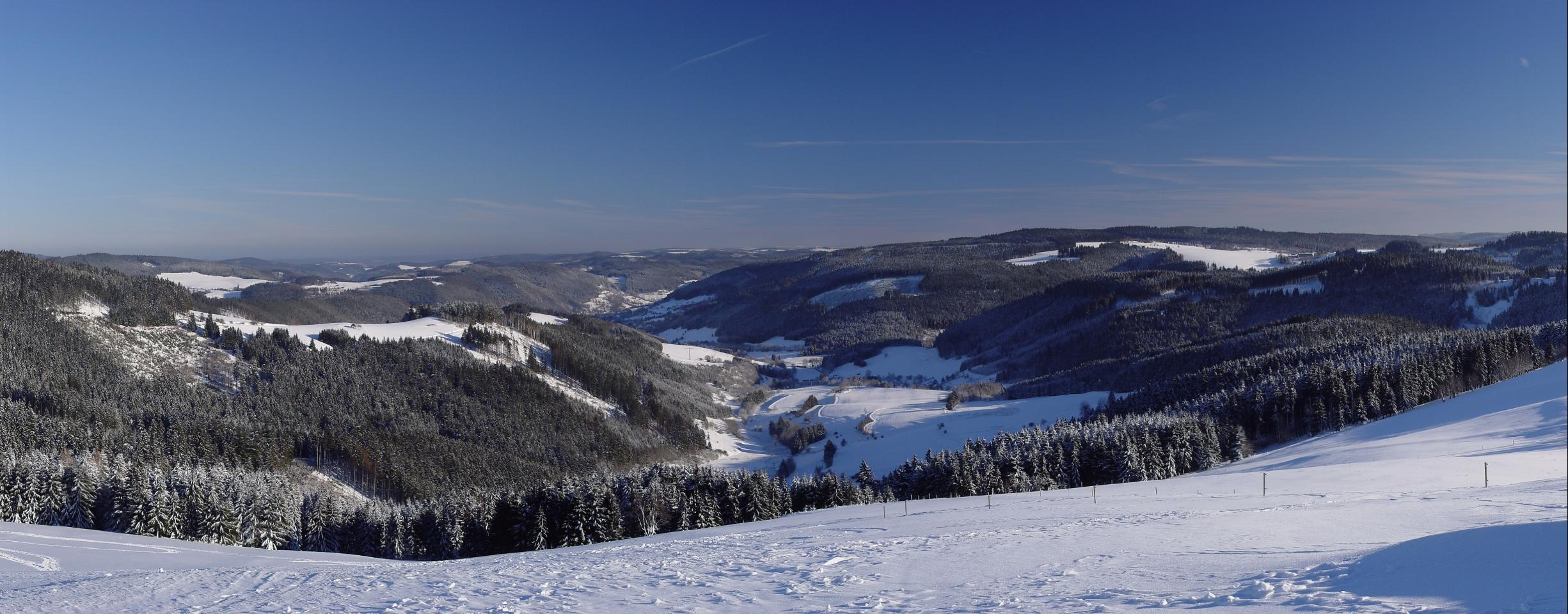 Winter im Thüringer Schiefergebirge